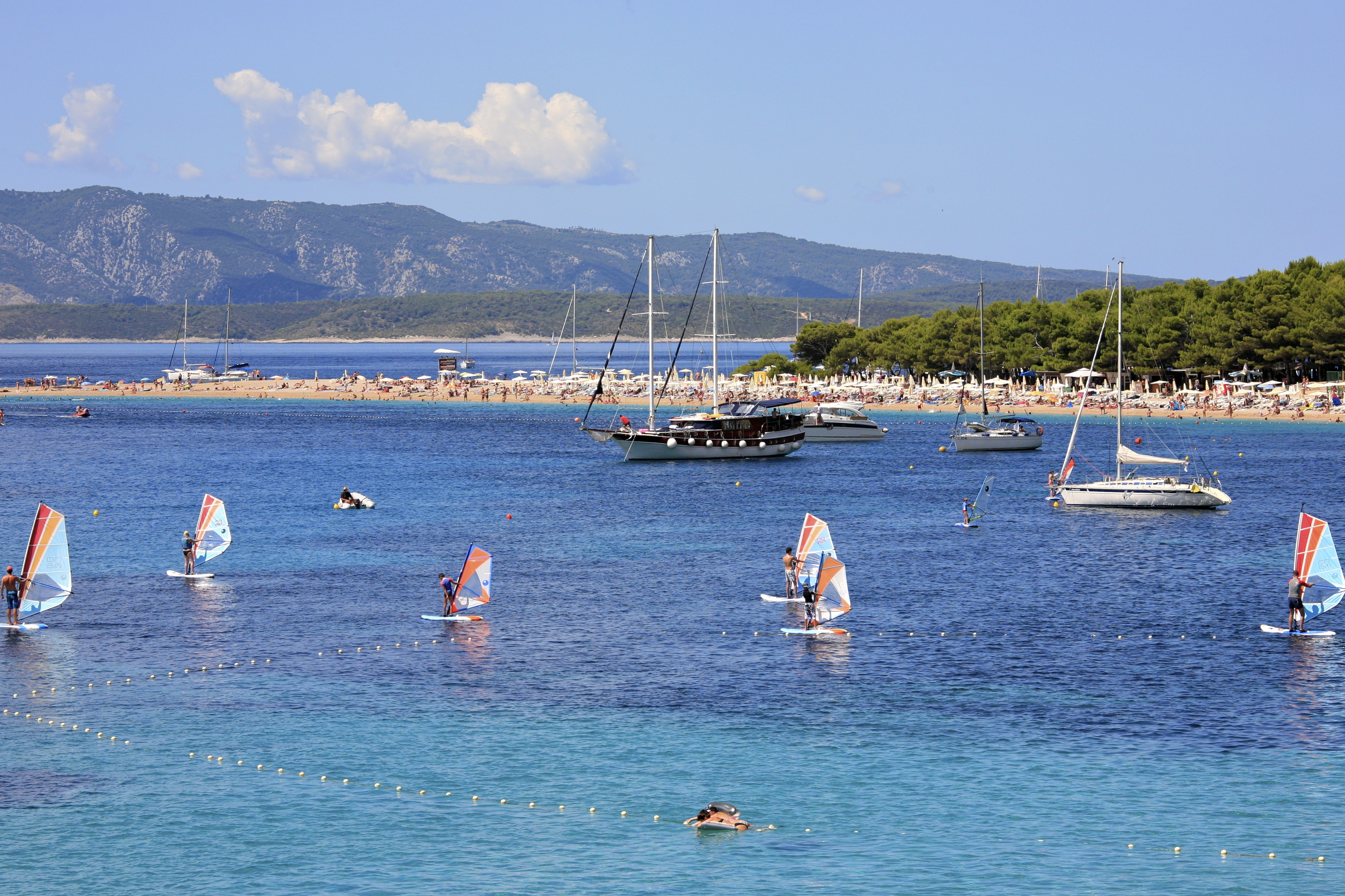 Weekend at Bol